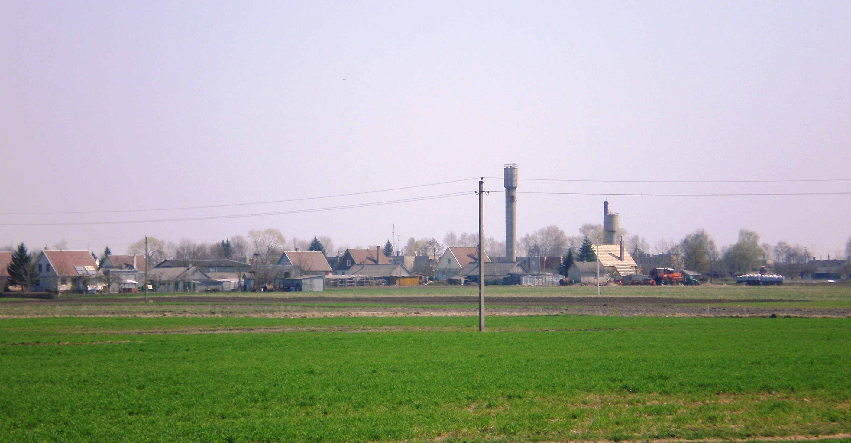 Vainikai, Josvainių sen., Kėdainių raj.